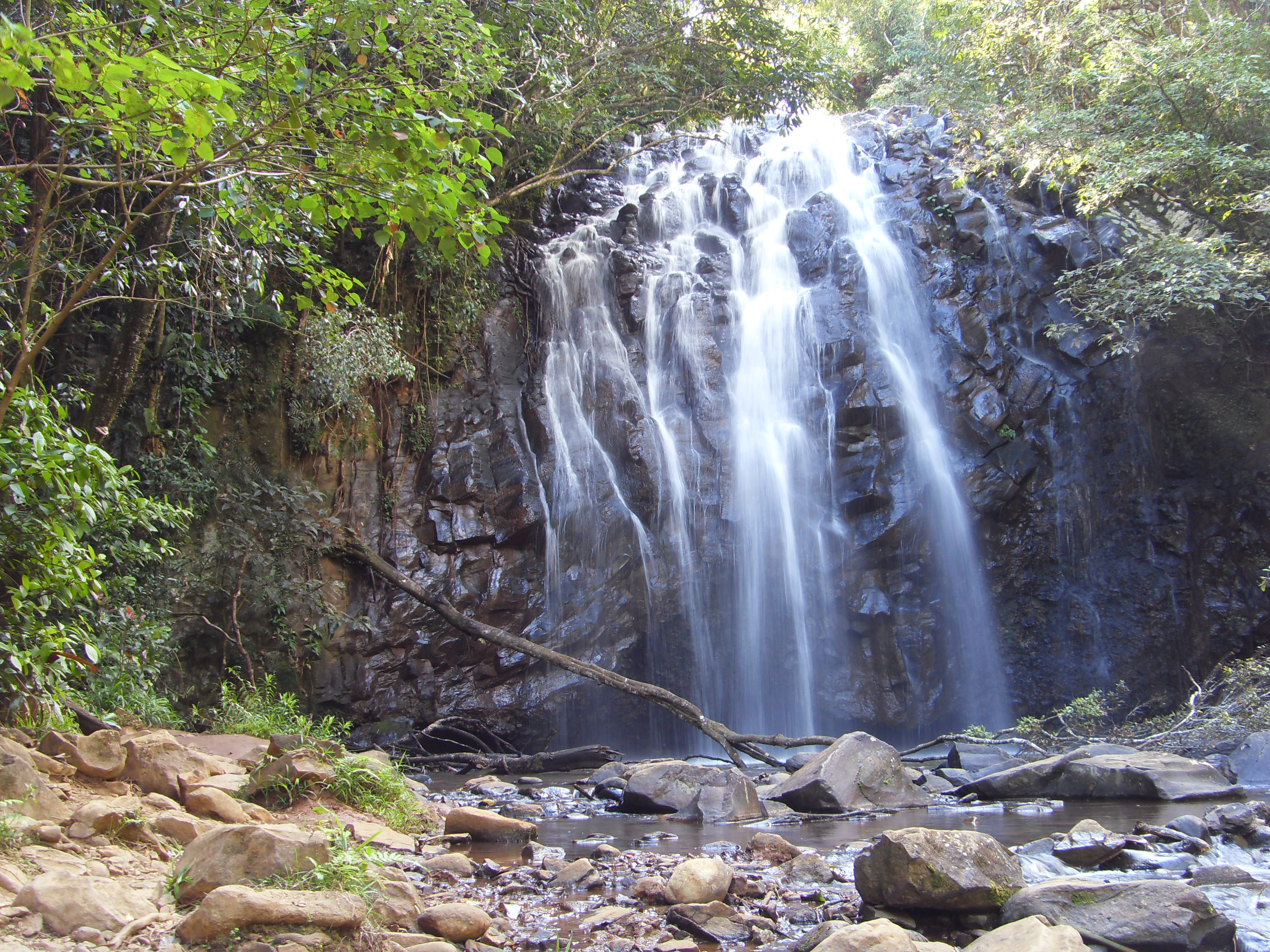 Ellinjaa Falls